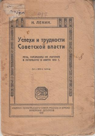 Ленин Н. Успехи и трудности Советской власти: Речь, сказанная на митинге в Петербурге 13 марта 1919 г. Пг., 1919. Прижизненное издание.